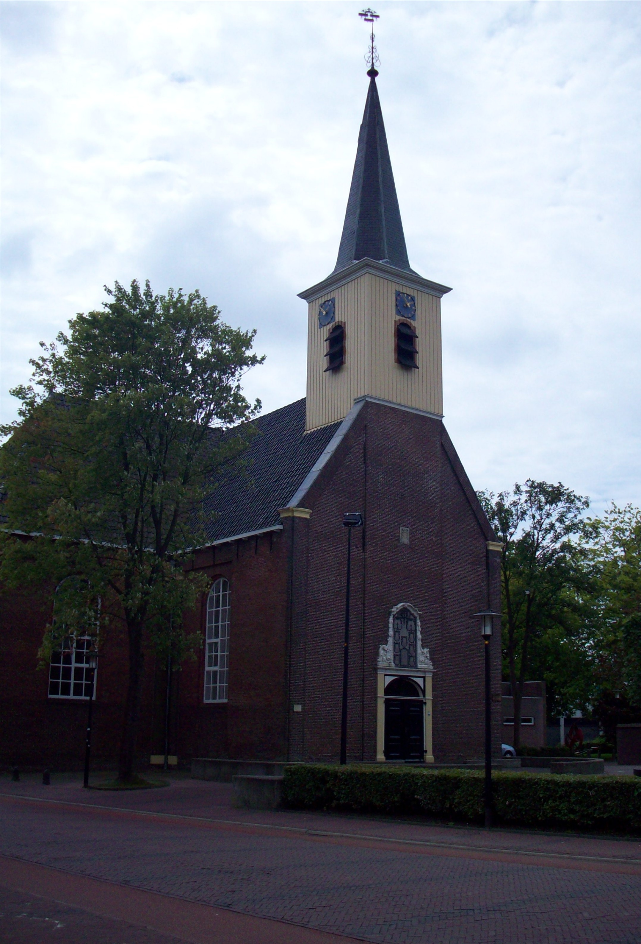 Drachten